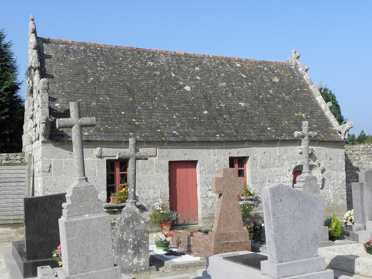 Ossuaire de l'église Saint-Goulven à Goulven (29).